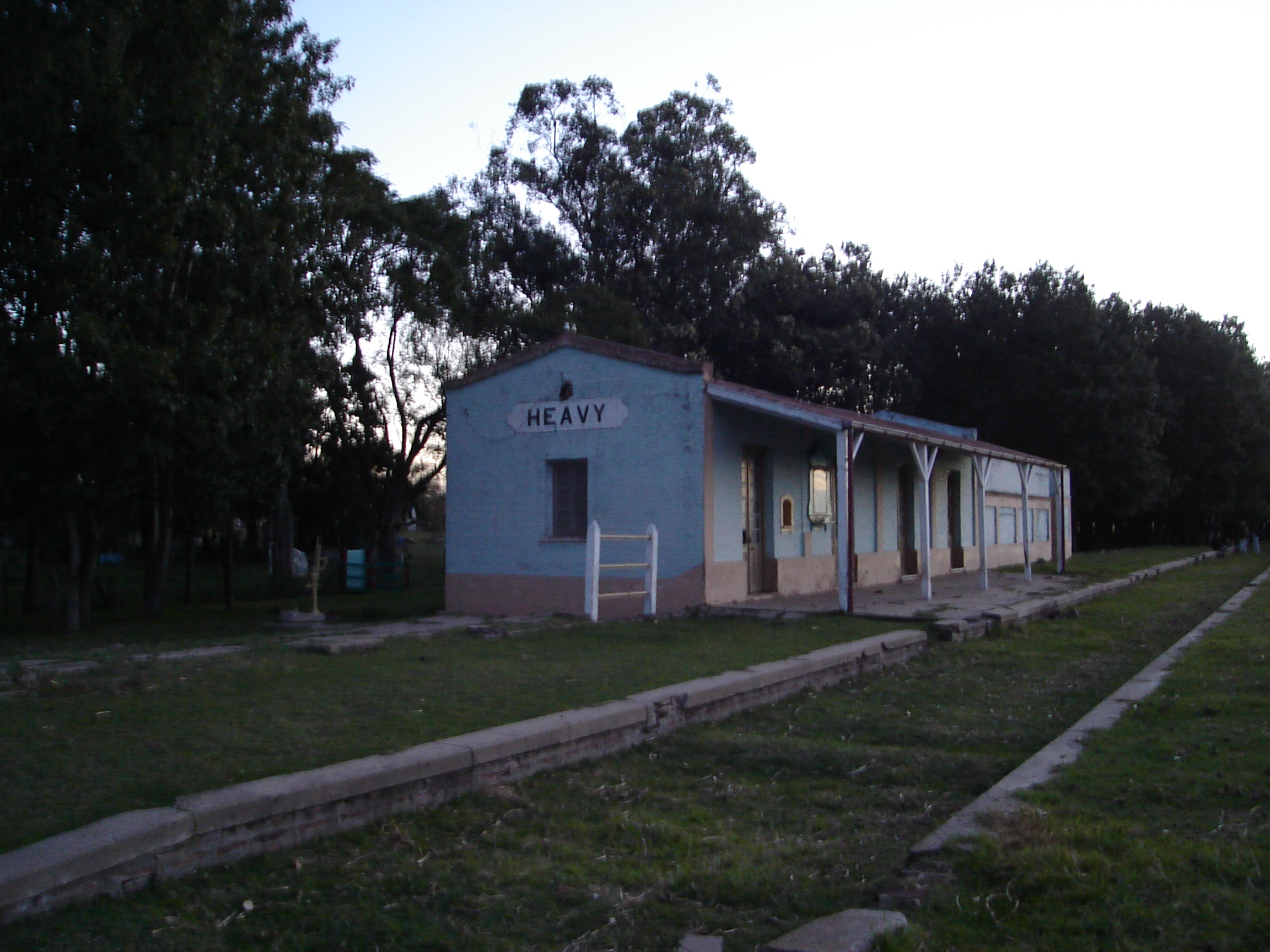 Estación Heavy del FC Urquiza, Prov de Buenos Aires, Argentina